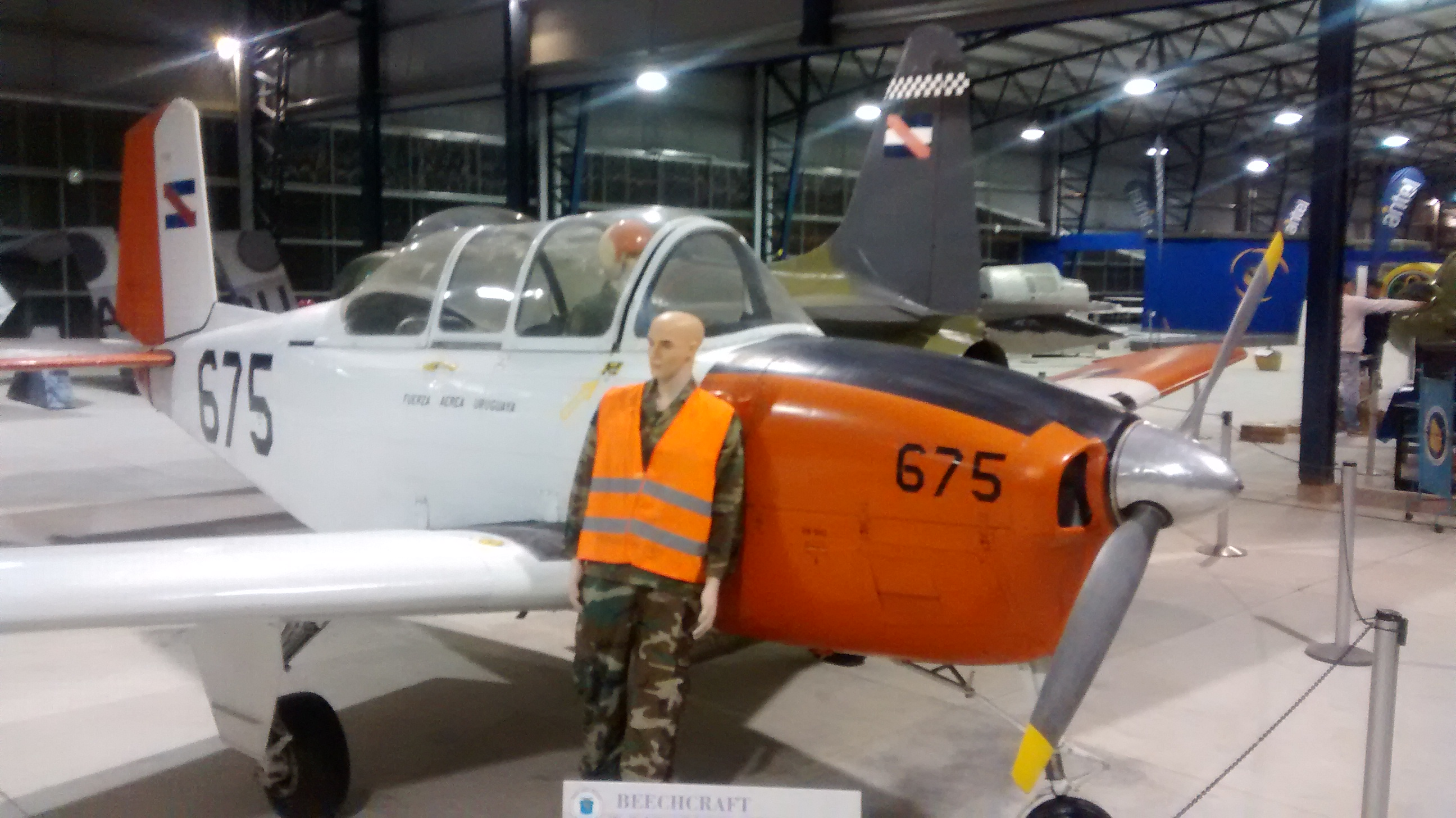 Beech T-34 Mentor FAU 675